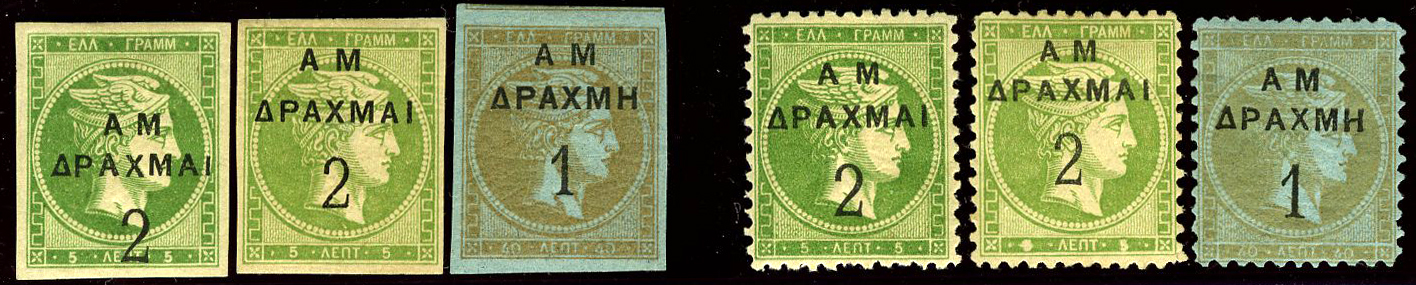 Grosses têtes surchargées AM